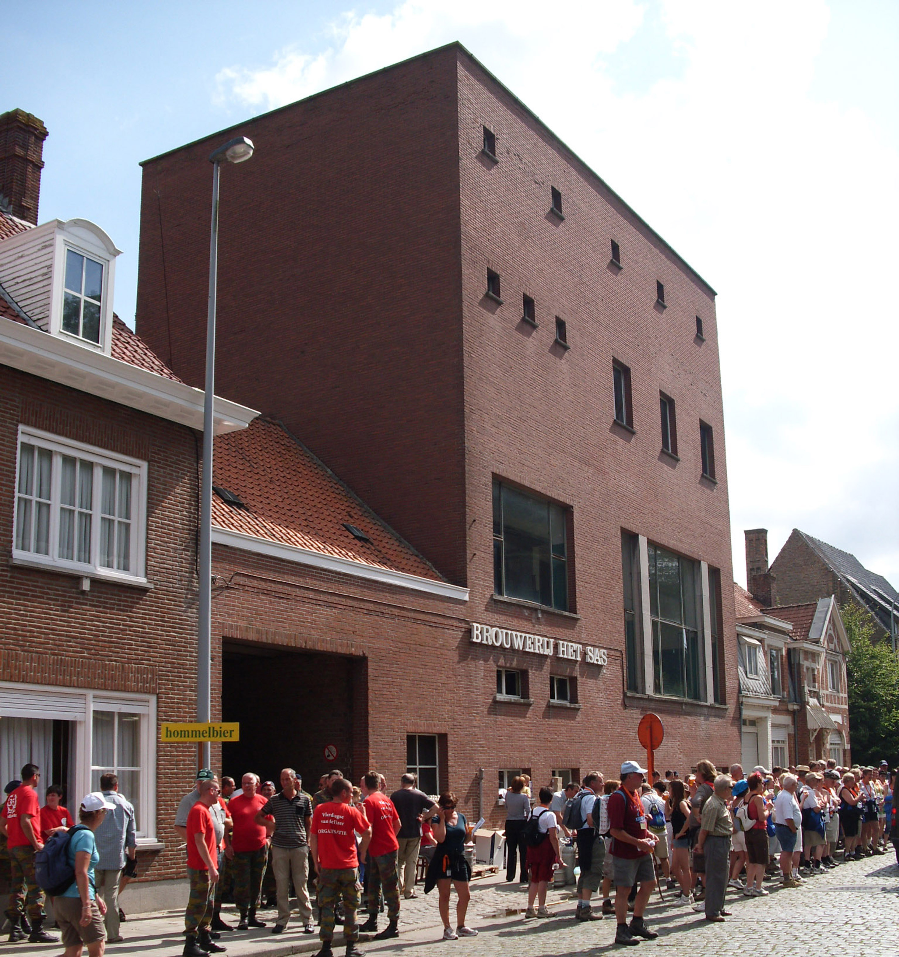 Brouwerij Het Sas in Boezinge - Ieper - West-Vlaanderen - Vlaanderen - België. Foto genomen tijdens de Vierdaagse van de IJzer 2009 - op 22 augustus 2009. Eigen foto